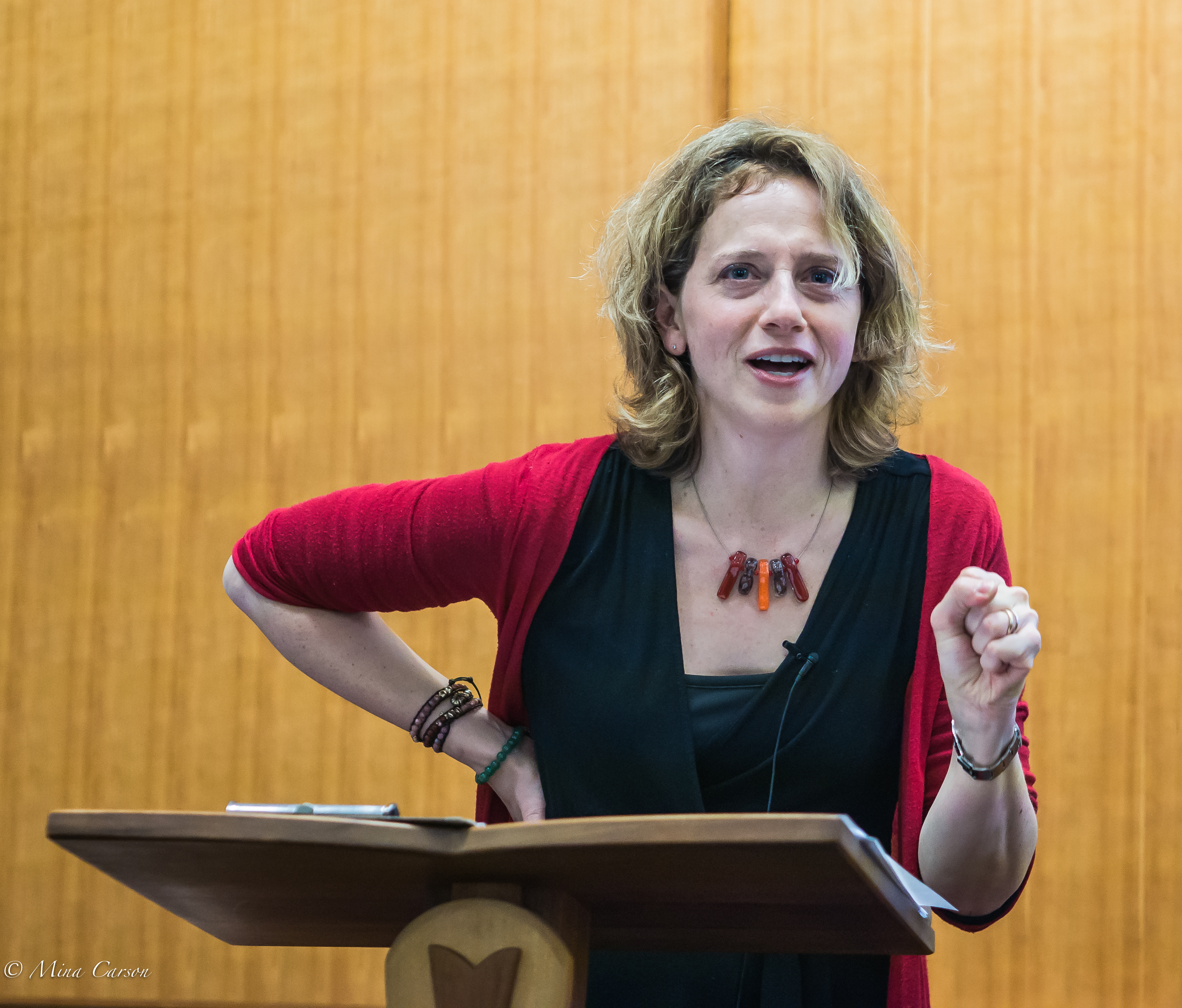 Jennifer Ratner-Rosenhagen March 6 2014-104